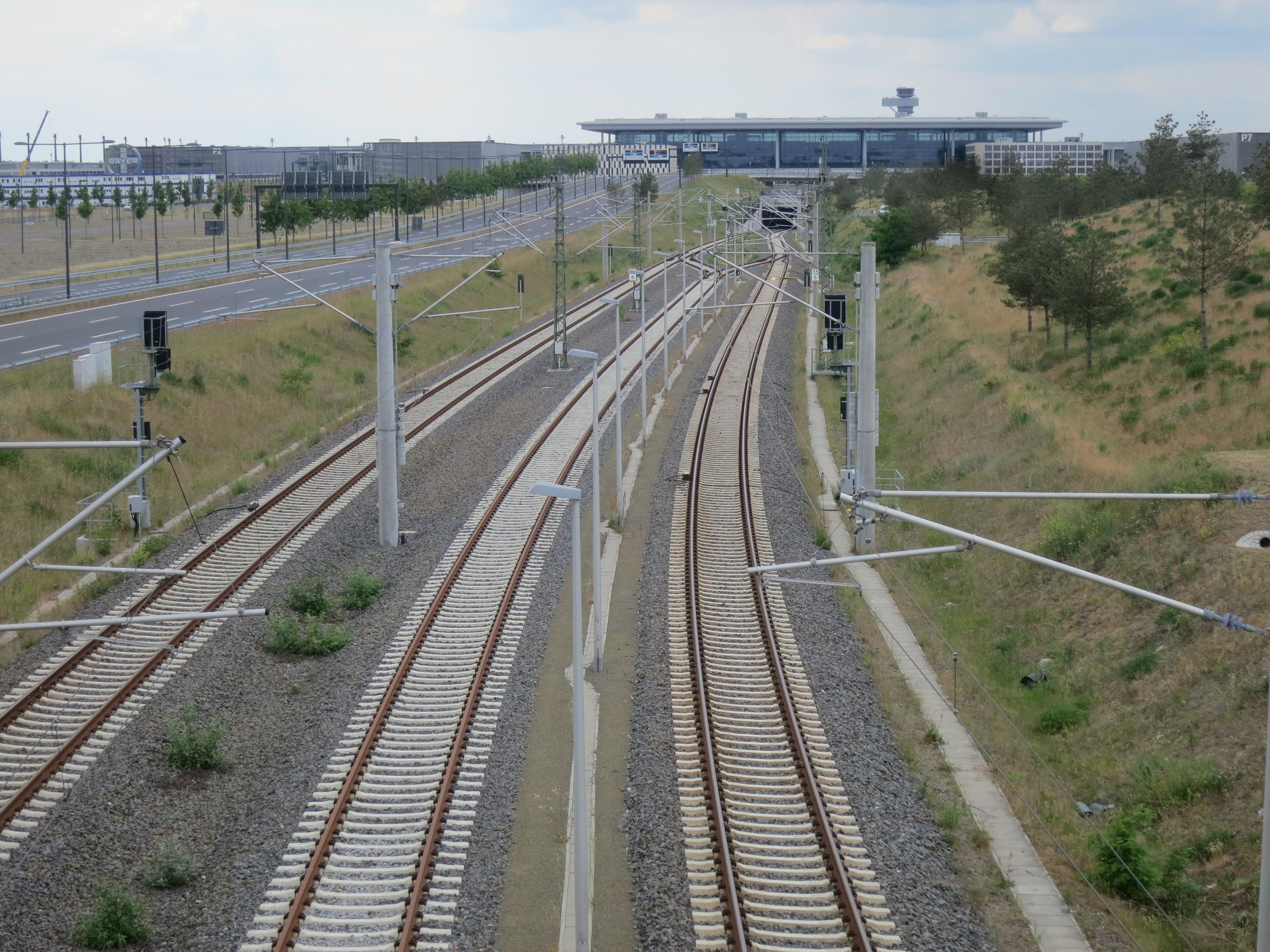 Bahnhof Flughafen Berlin Brandenburg, Ostkopf mit Aufstellgleis für Regionalzüge